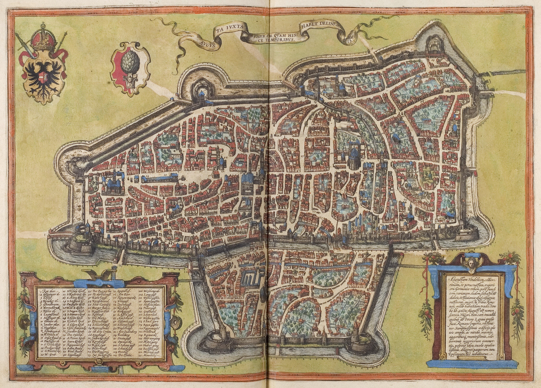 Augsburg